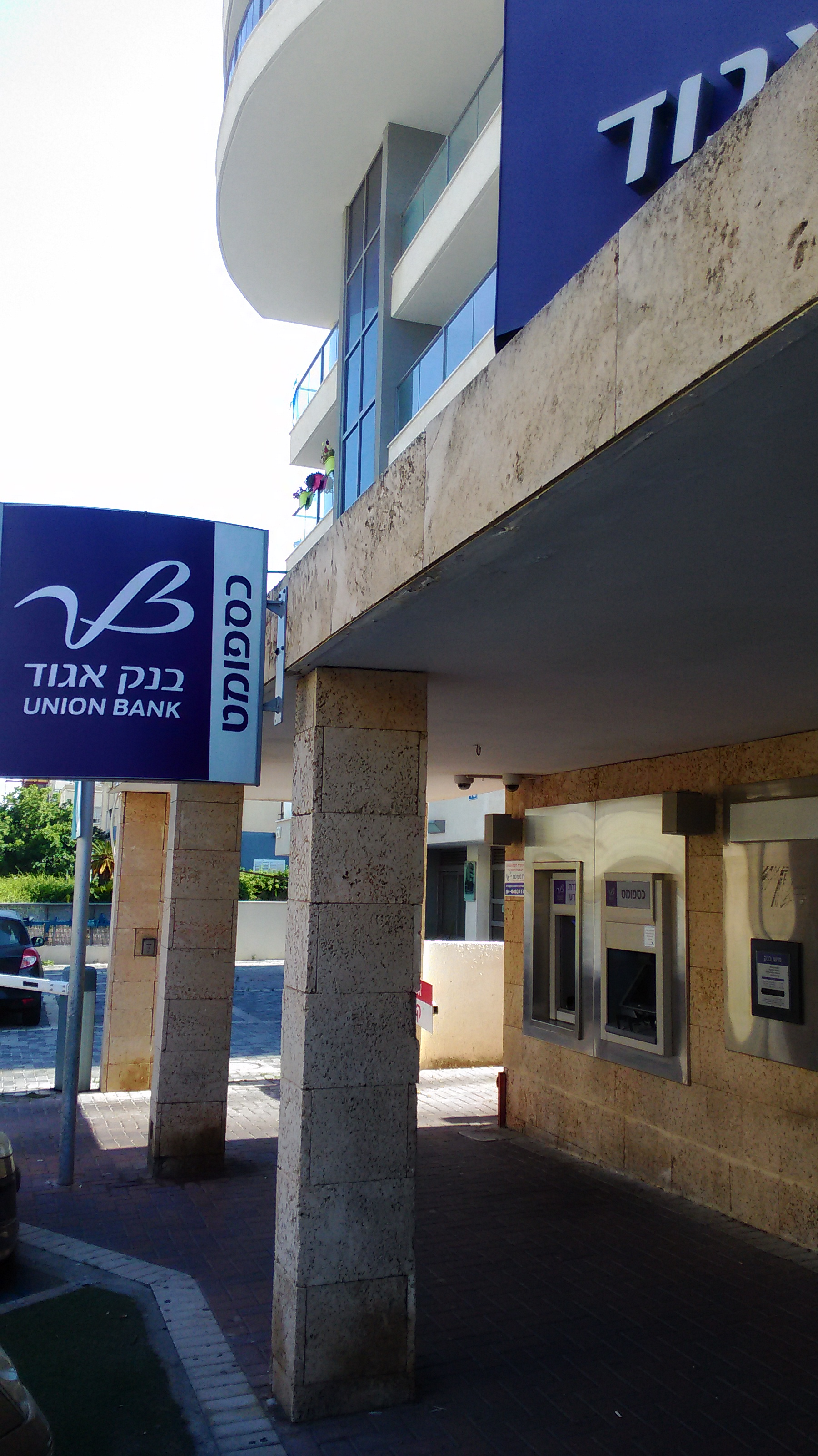 בנק איגוד, סניף קרית מוצקין